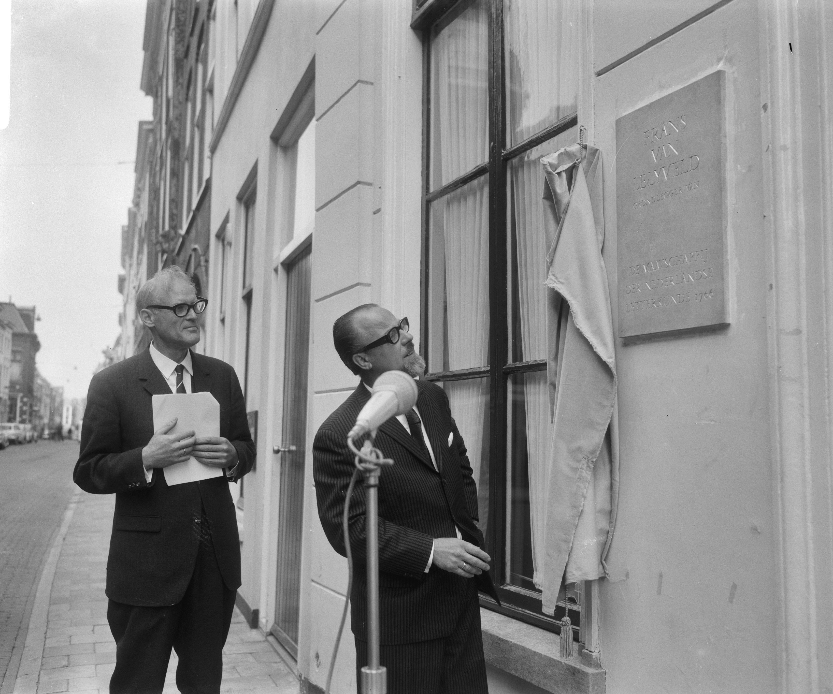 Tweehonderd jarig bestaan Maatschappij der Nederlandse Letterkunde, steen te Leiden onthuld voor oprichter Frans van Lelyveld door de heer J.C. Denninger (links prof. dr. K Heeroma). 18 mei 1966